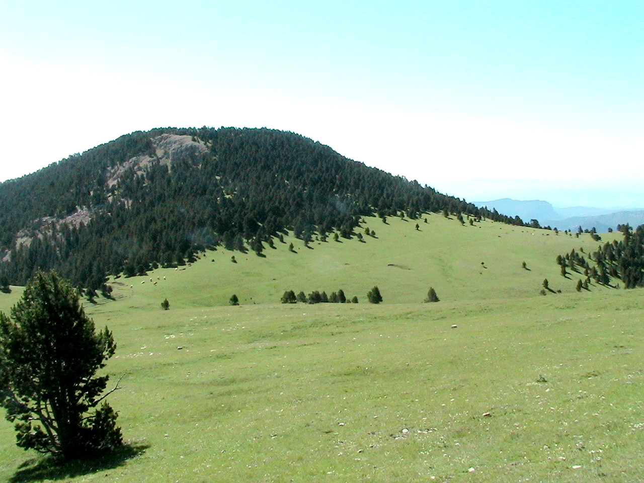 El coll dels Belitres i el cap d'Aubes, a la Serra del Verd This is a a photo of a natural area in Catalonia, Spain, with id: ES510193